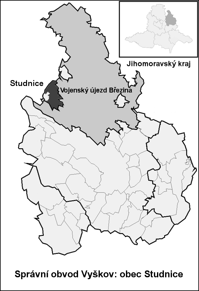 Hranice Studnice (Vyškov- czech republic)